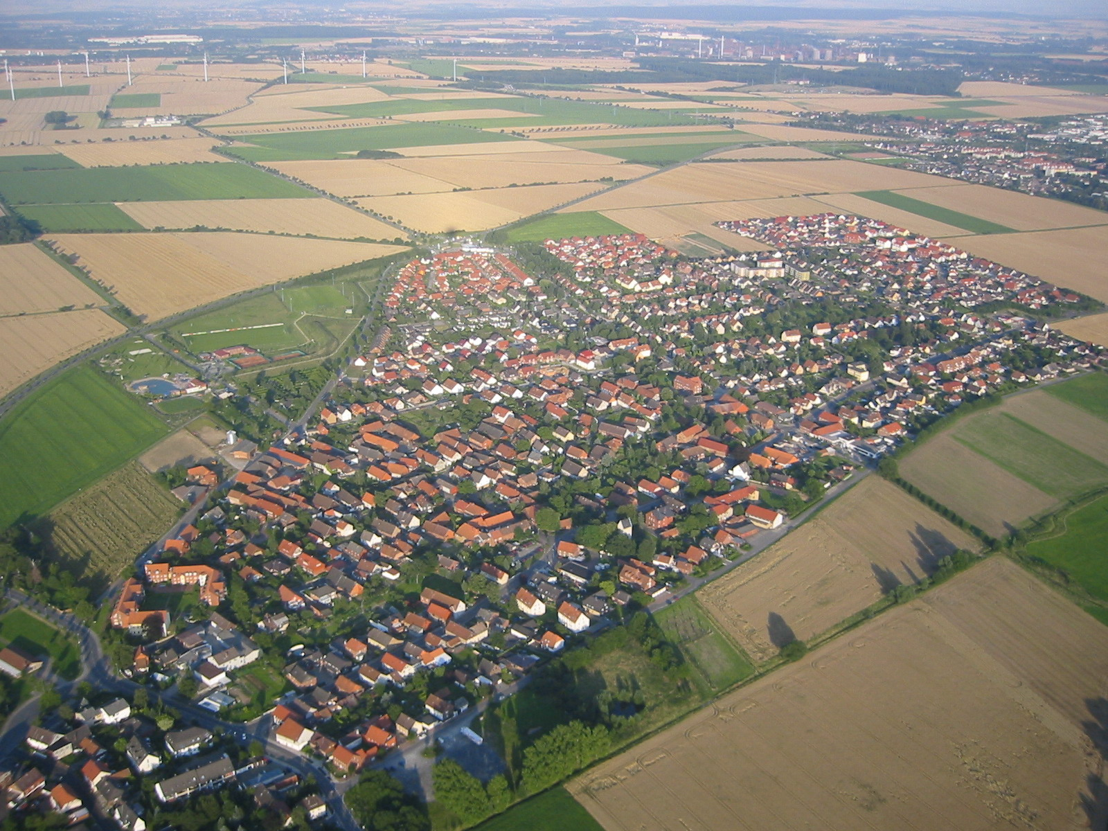 Luftbild von Broistedt, Gemeinde Lengede